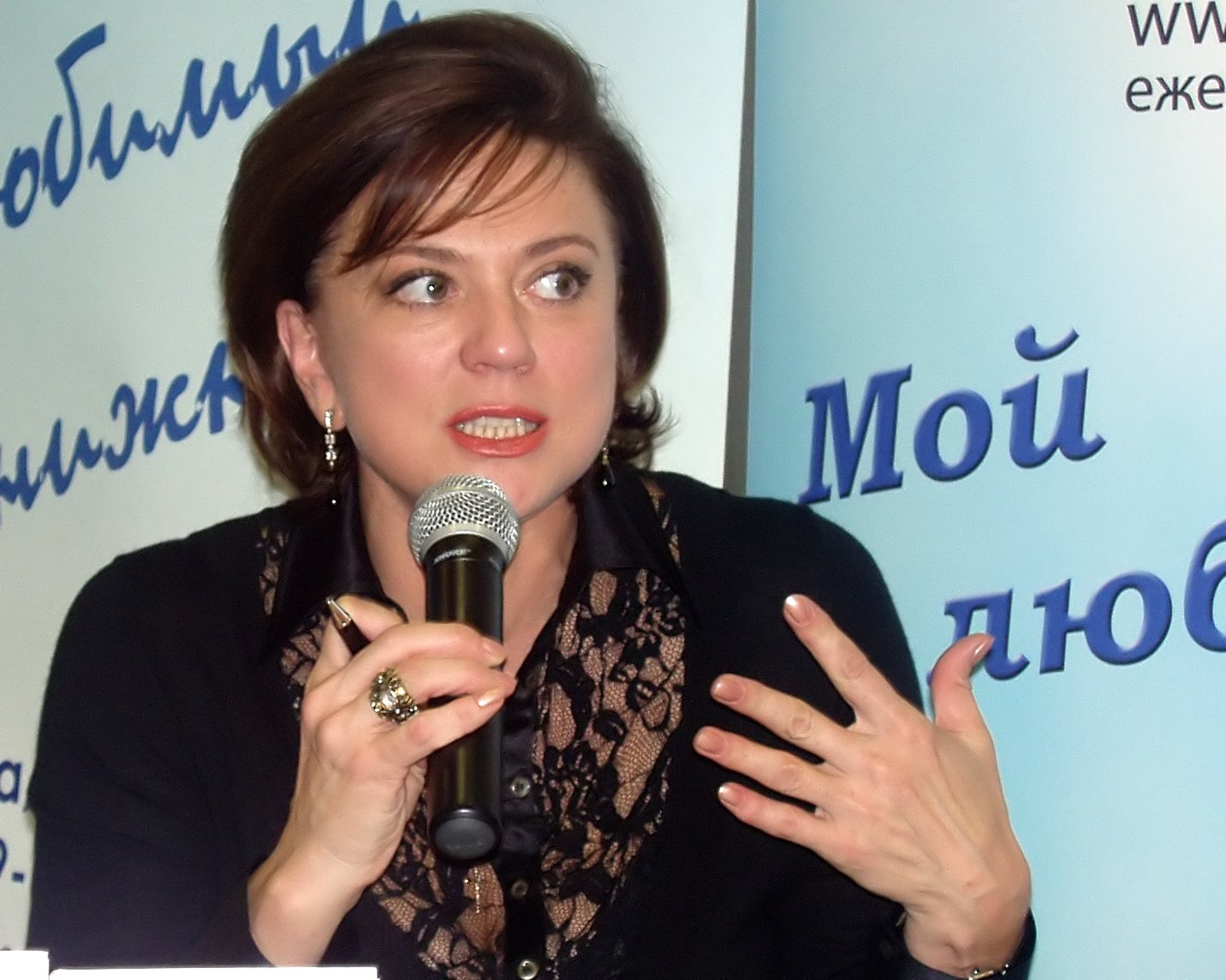 Светлана Сорокина на презентации своей книги